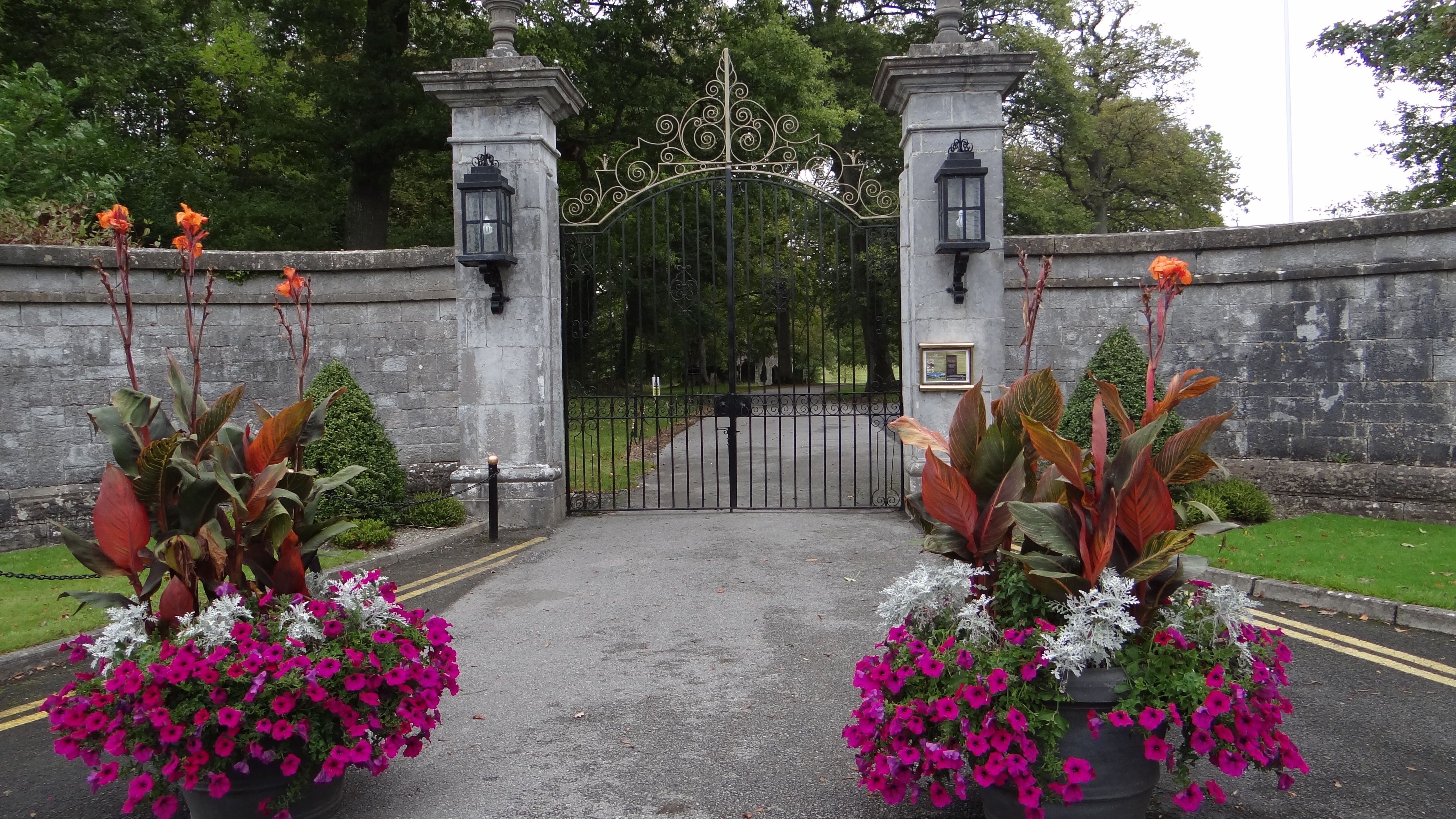 Adare, Irlande, entrée du château